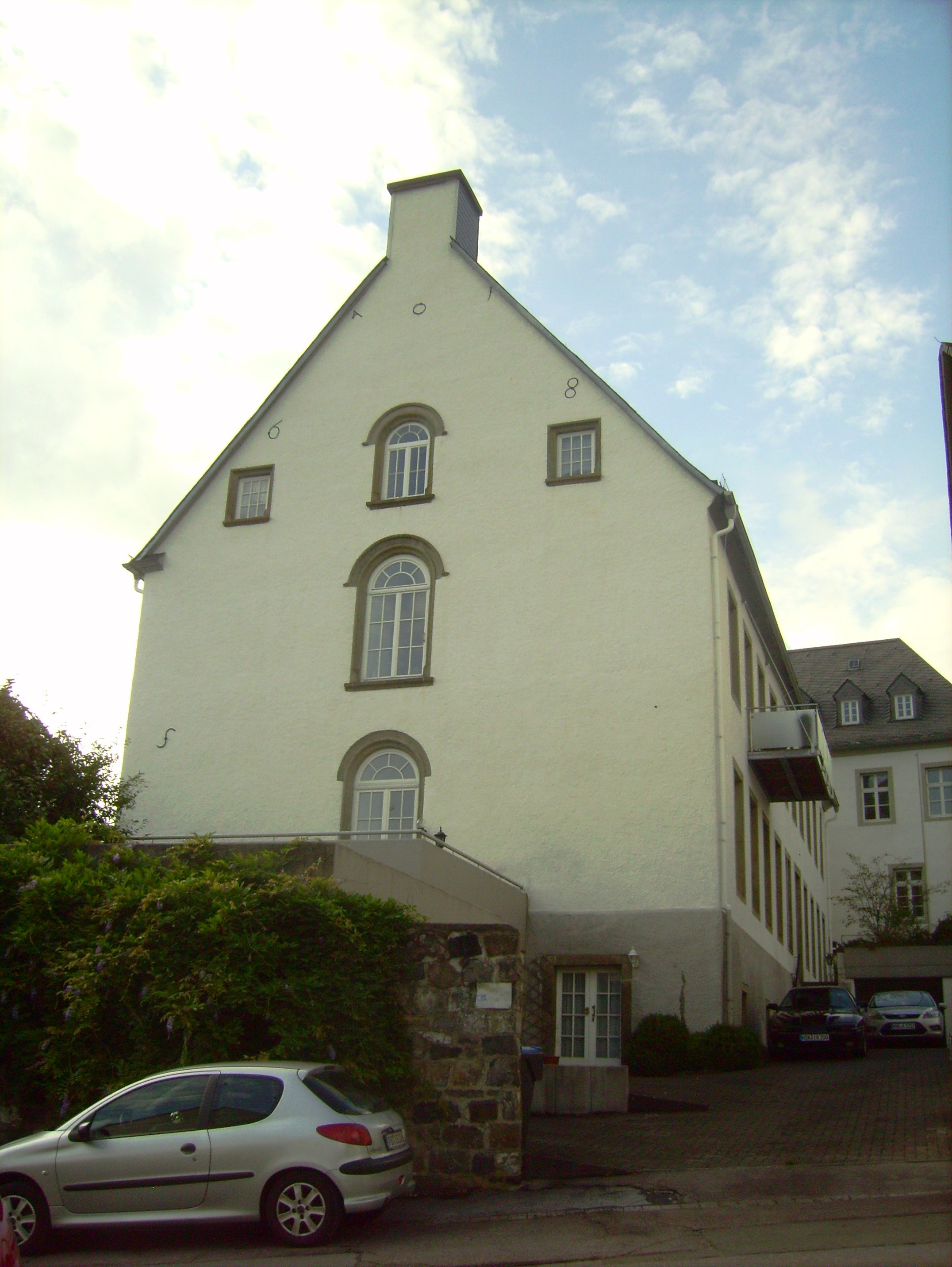 Dückertscher Hof in Arnsberg